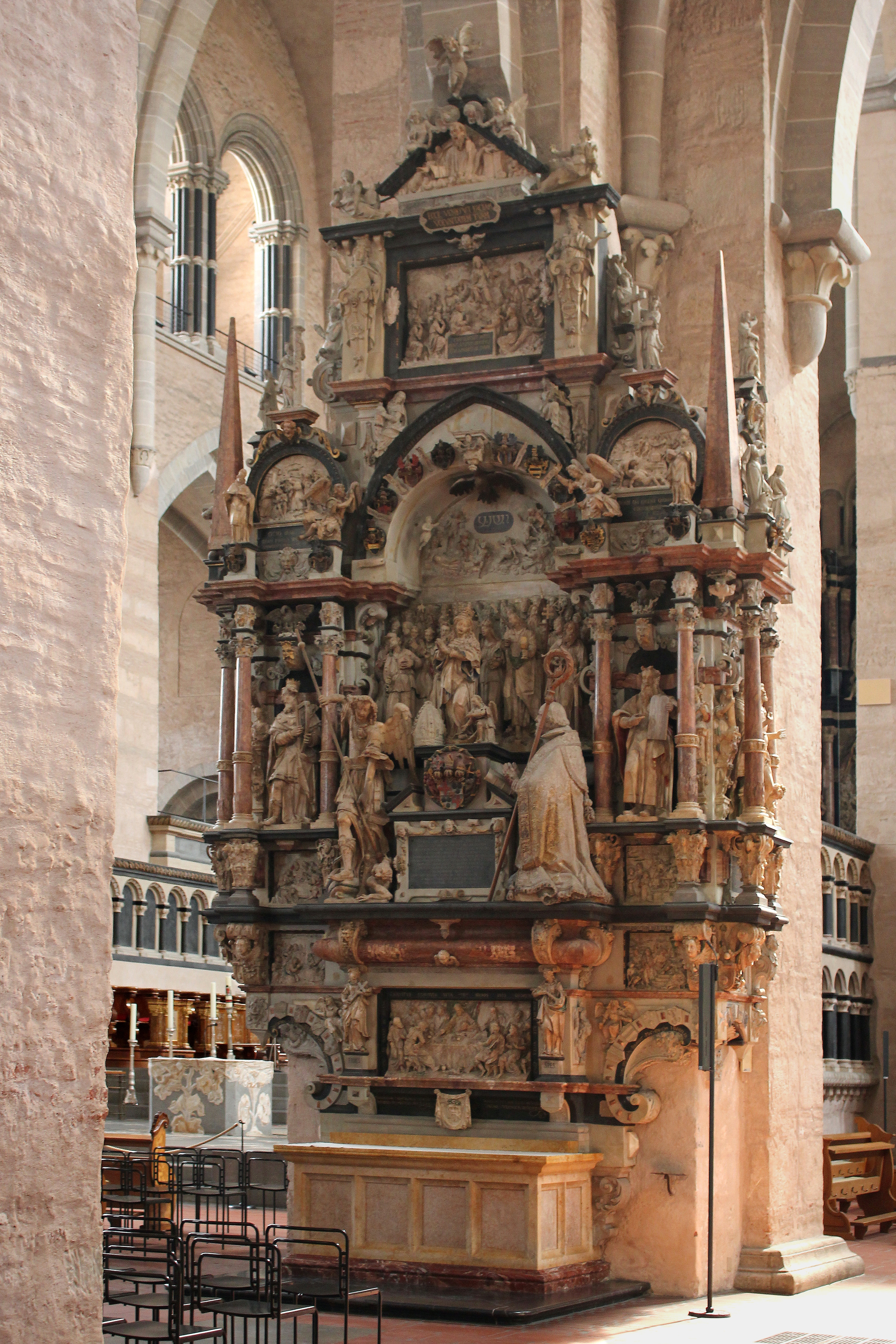 Allerheiligenaltar im Trierer Dom, Grabaltar des Kurfürsten Lothar von Metternich, bereits zu seinen Lebzeiten errichtet, 1614 geschaffen von Hans Ruprecht Hoffmann